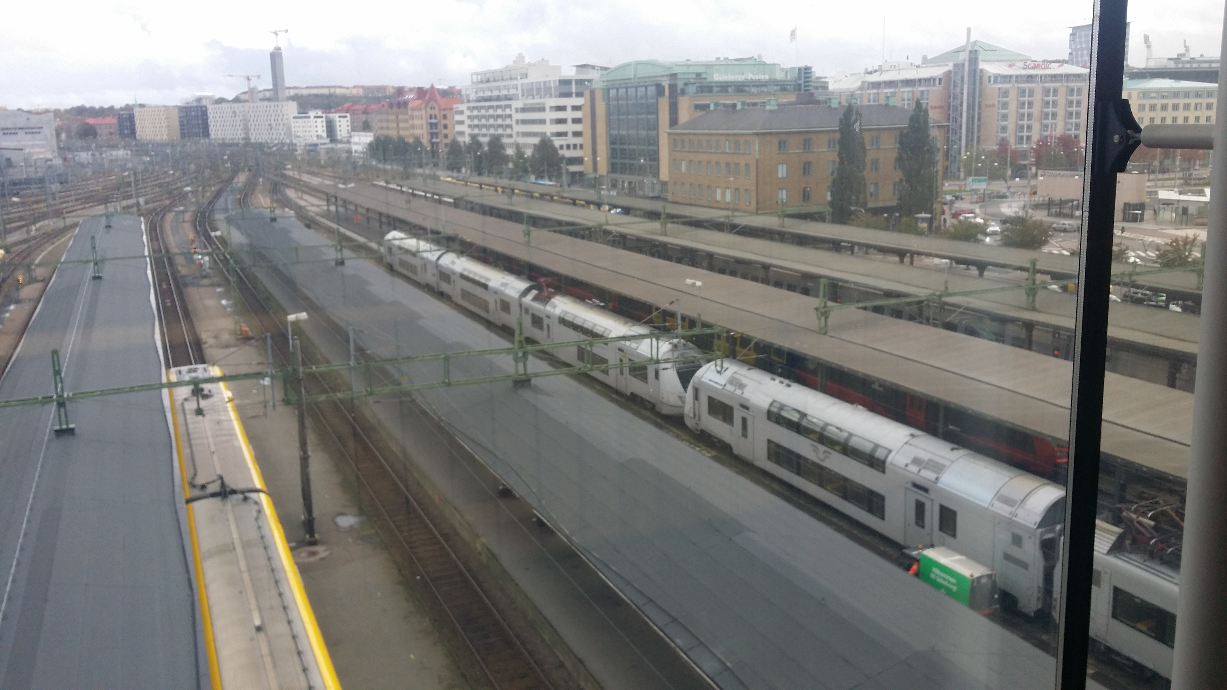 Stasjonen sett fra hotellet.